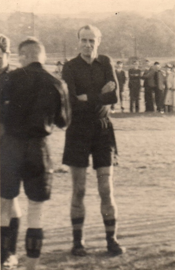 Helmut Schön, deutscher Fußballspieler und späterer Bundestrainer, bei einem Spiel der SG Dresden-Friedrichstadt in Reichenberg, Ortsteil von Moritzburg, Landkreis Meißen, Sachsen